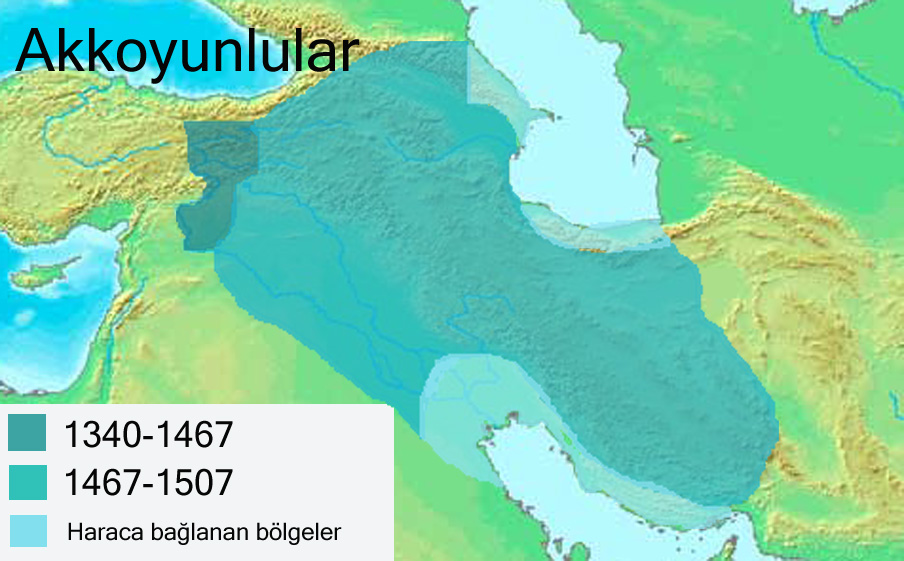 Kaynak: ja:白羊朝 sayfasında bulunan harita yardımı ile kendim ürettim.